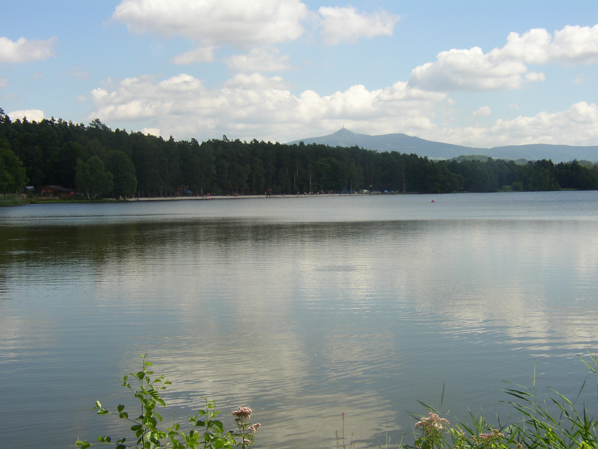 Hamr na Jezeře, Česká republika